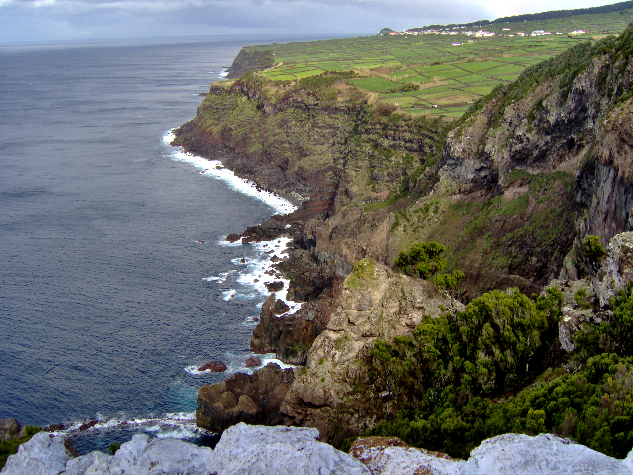 Raminho, zona costeira, Angra do Heroísmo, Terceira, Açores